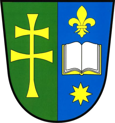 znak, Měcholupy, okres Plzeň-jih